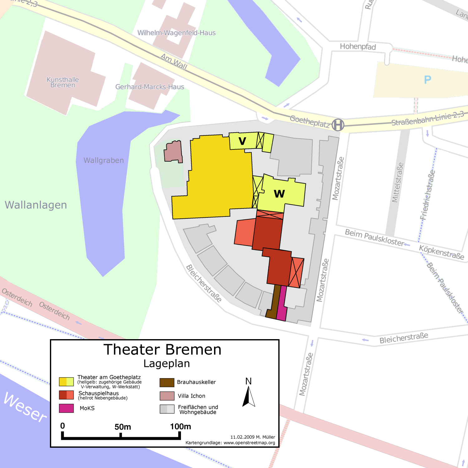 Lageplan des Theaters in Bremen.